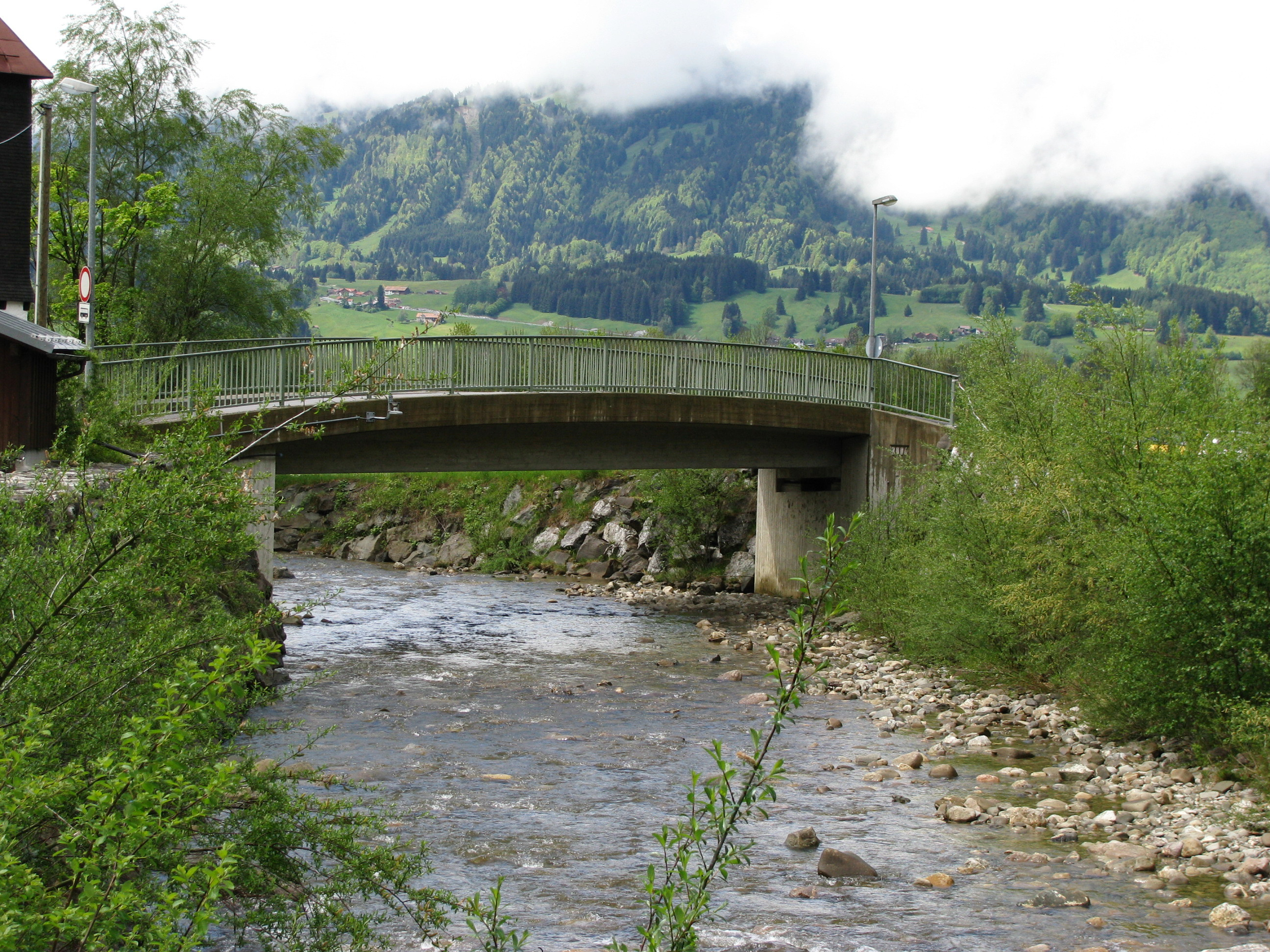 Die Starzlach an der Brücke in Sonthofen-Winkel.